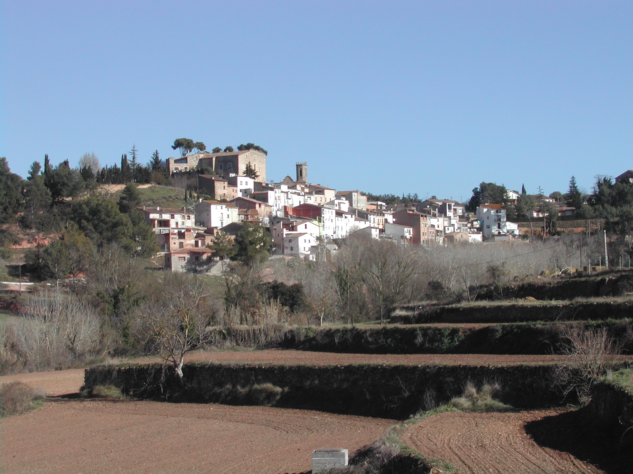 Vista de la Torre de Claramunt des de La Malesa